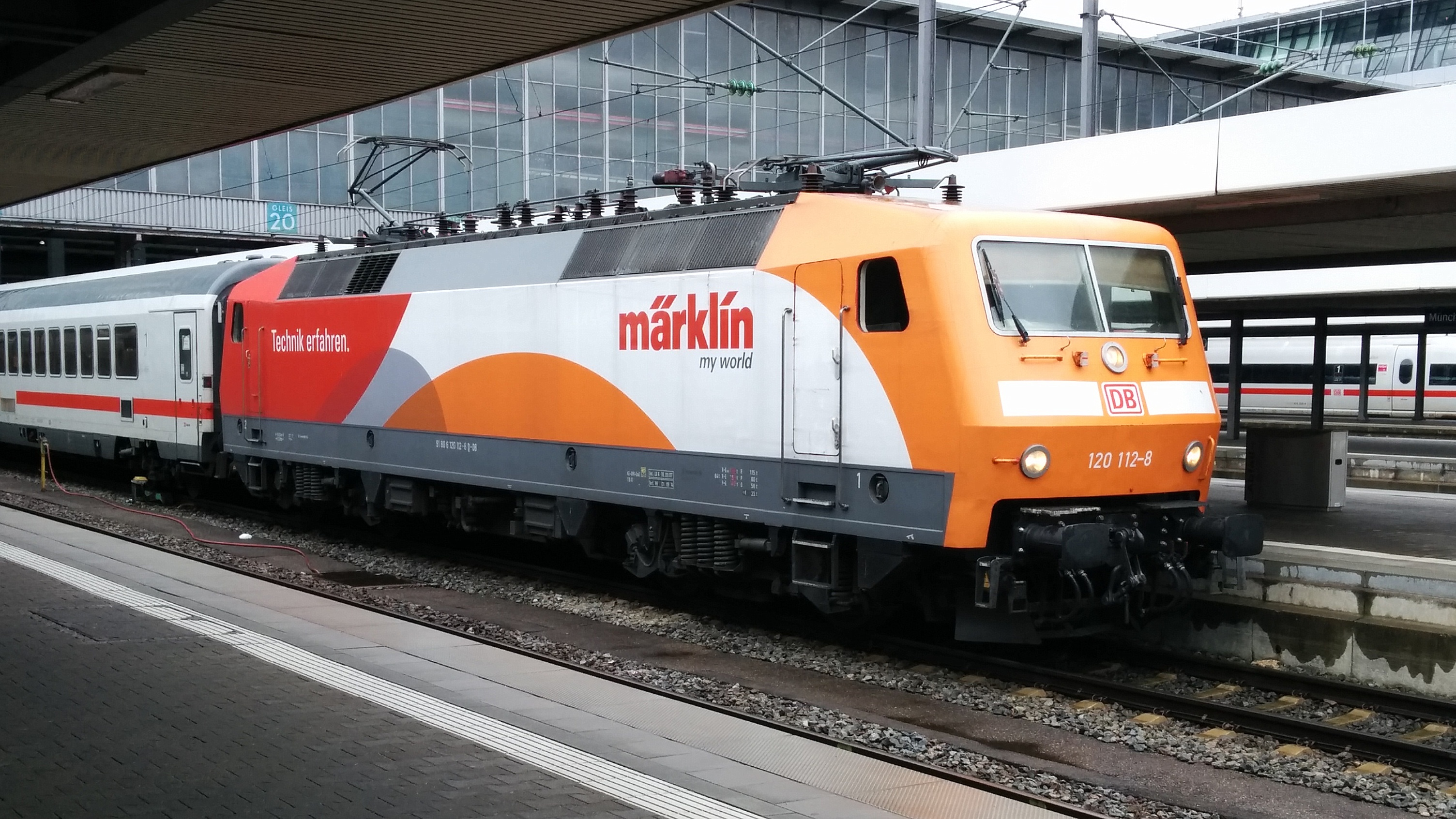 DB 120 112-8 im Märklin-Design mit ICE am Hauptbahnhof München